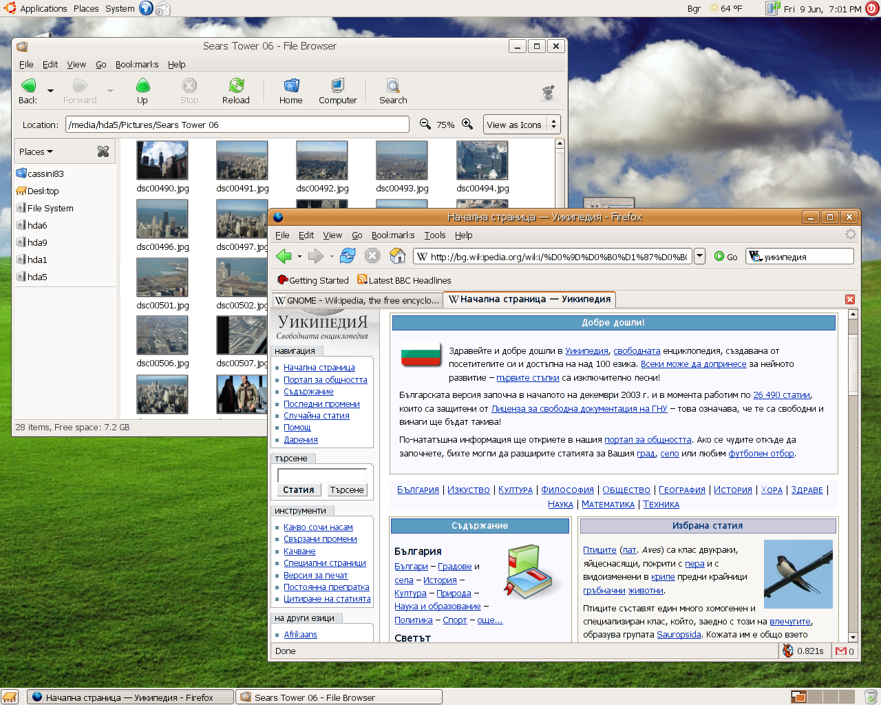 6.06 Dapper Drake running firefox